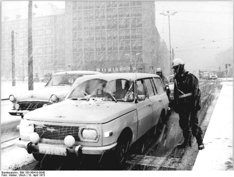 Dresden, Verkehrspolizist, Winter ADN-ZB Häßler 10.4.73 Dresden: Dichter Schnee über der Elbestadt. Starker Schneefall setzte am 10.4.73 in Dresden ein und hüllte die Stadt innerhalb kurzer Zeit in ein verspätetes Winterkleid, Für die Autofahrer bedeutet das noch größere Aufmerksamkeit im Straßenverkehr.